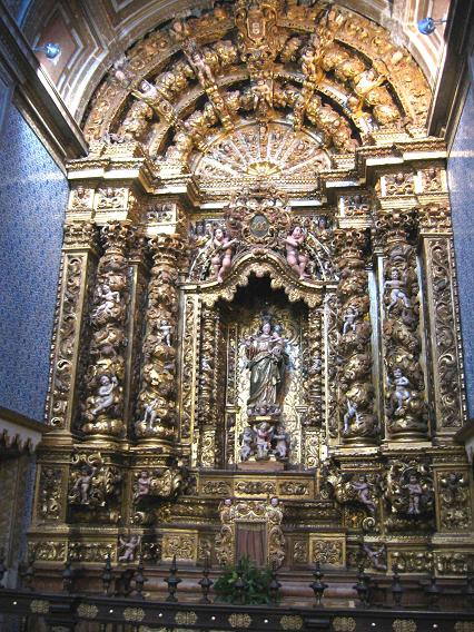 Monastery of Grijó - Mosteiro de Grijó - Retábulo